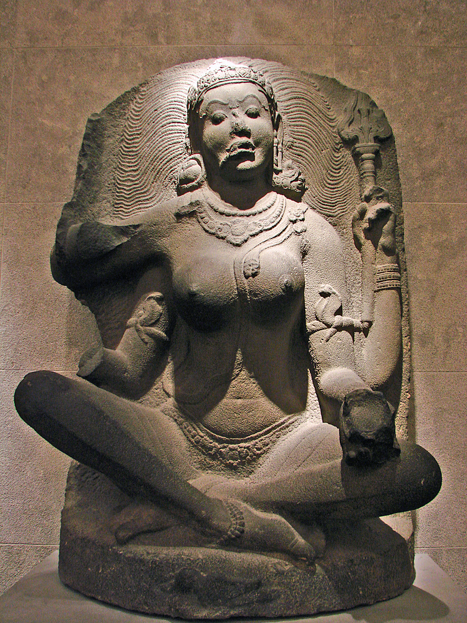 Matrika. Inde, Tamil Nadu, époque Chola, fin 9ème - début10ème siècle, granit. Musée Guimet, Paris.